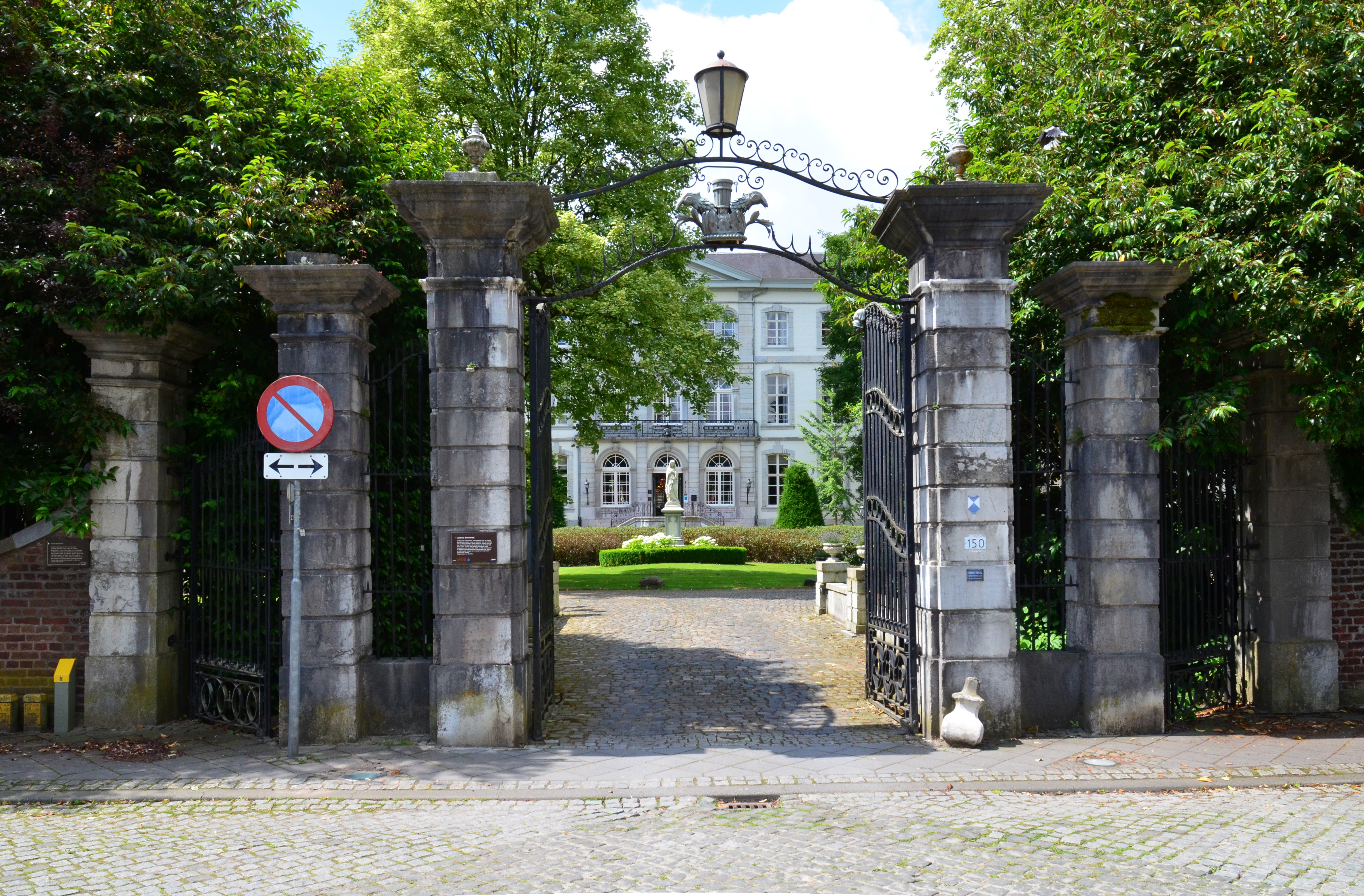 Haupttor des Schlosses Bloemendal in Vaals